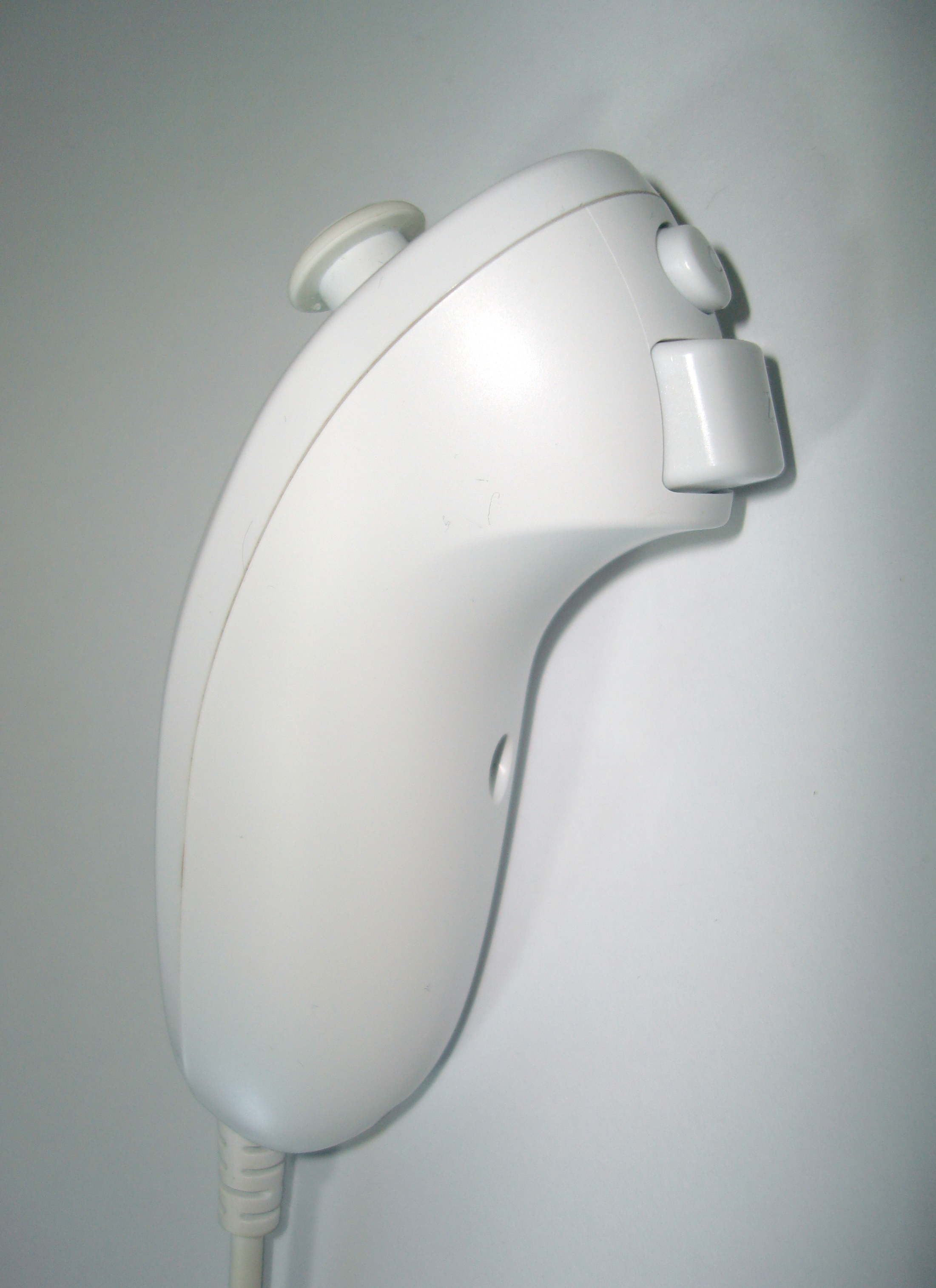 Wii Nunchuk Controller Side-view